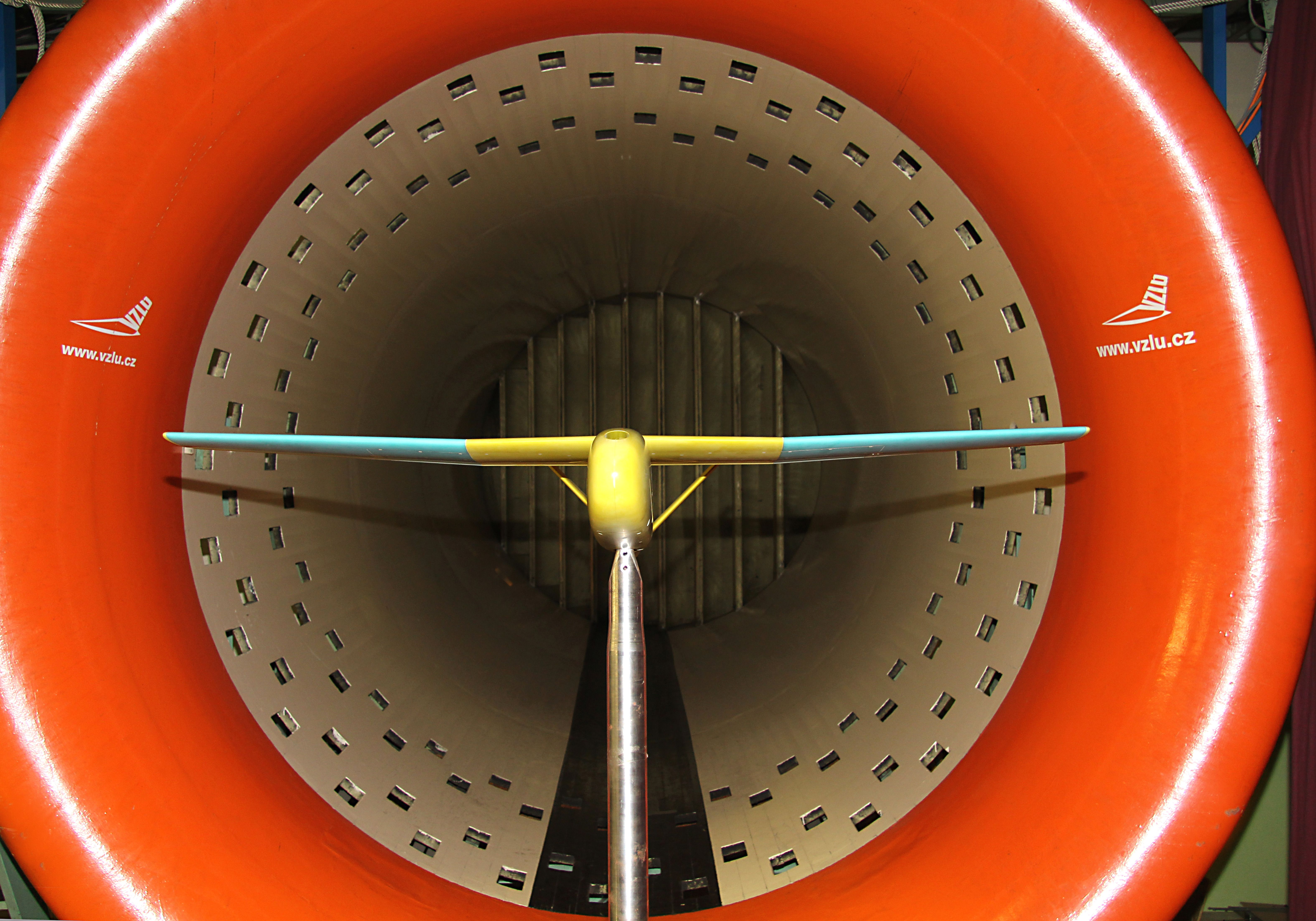 aerotunel vzlu